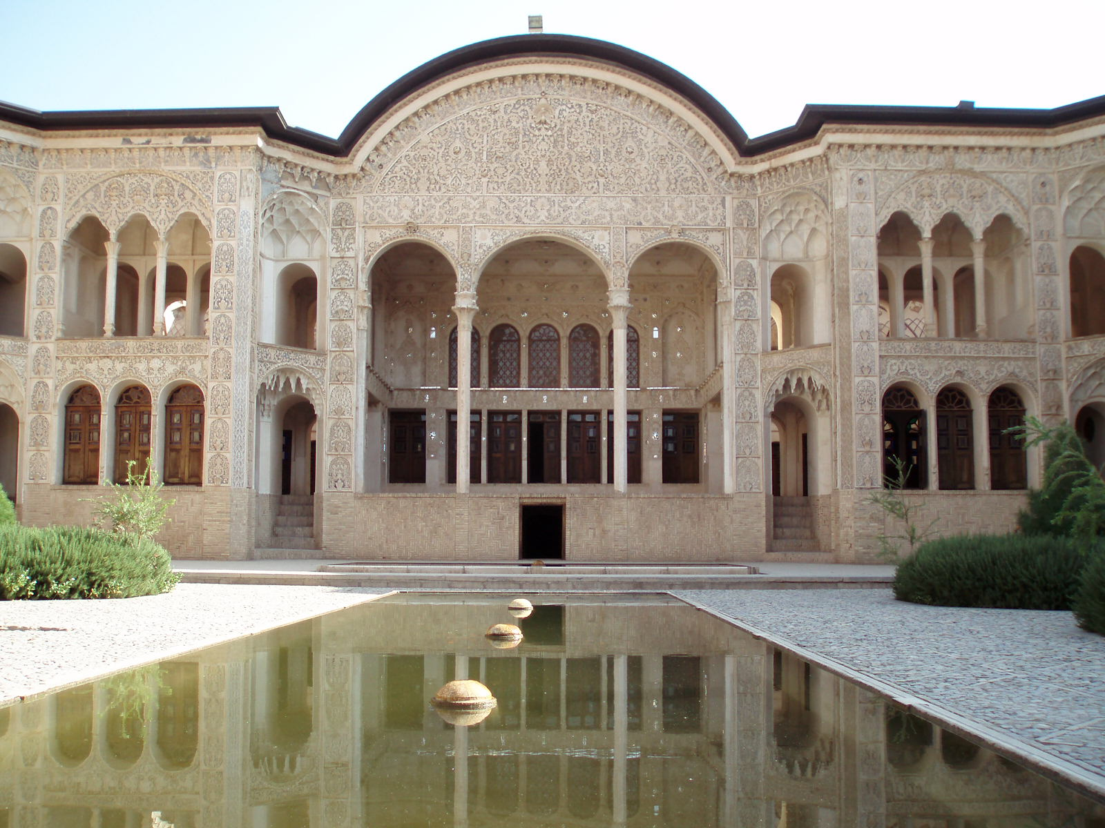 House of Tabatabai, Iran, Kashan.